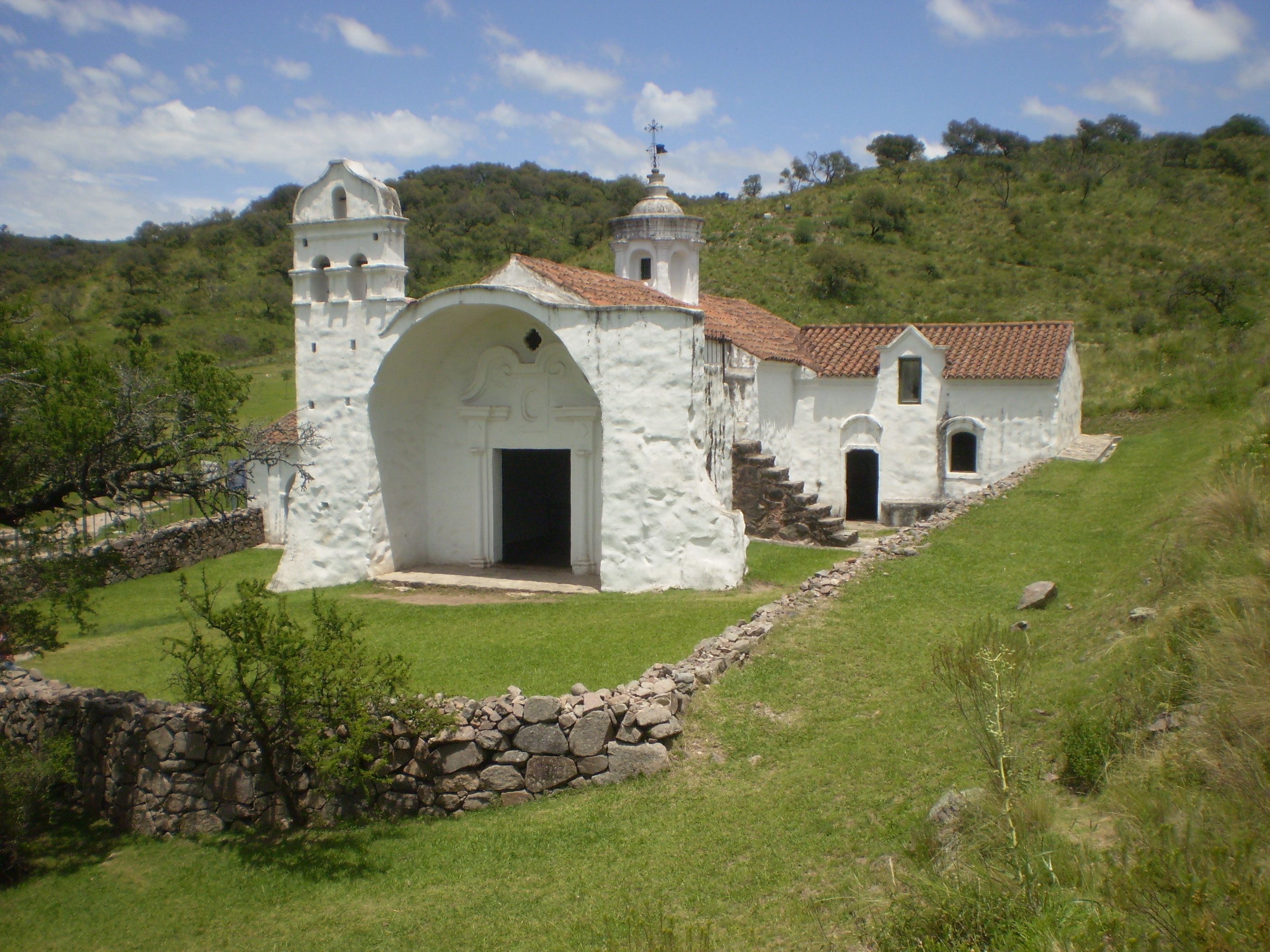 Capilla de la localidad cordobesa de Candonga (s XVIII). Argentina